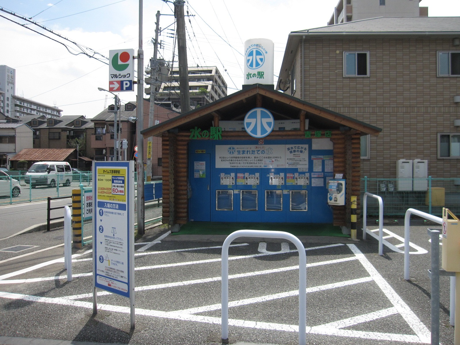 マルショク吉塚駅東店の駐車場内にある水の駅吉塚店